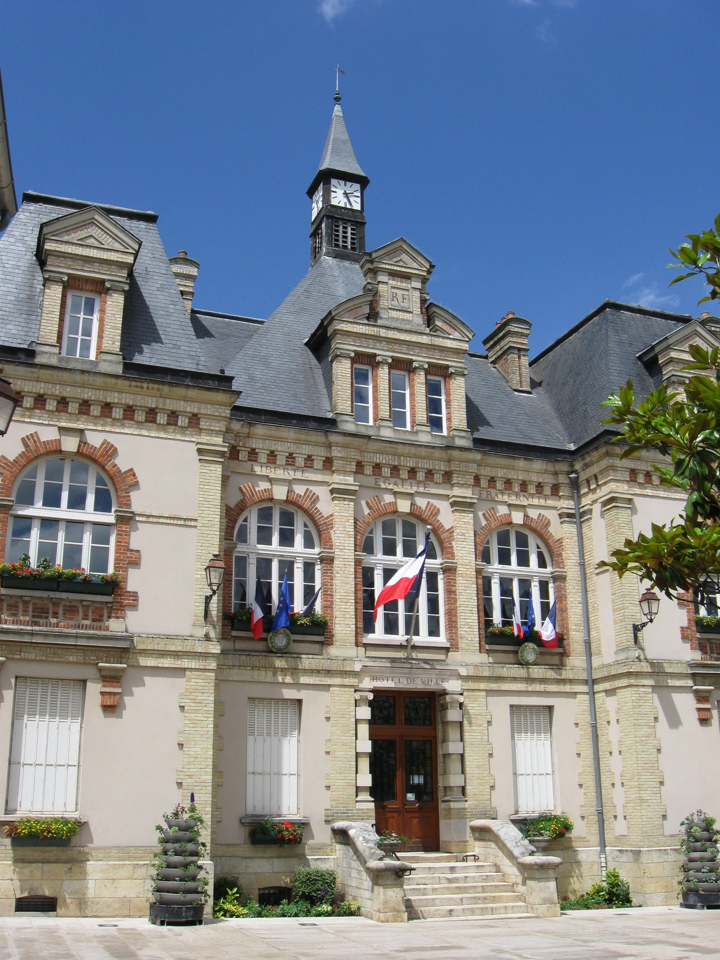 L'hôtel de ville de Malesherbes (Loiret , région Centre)